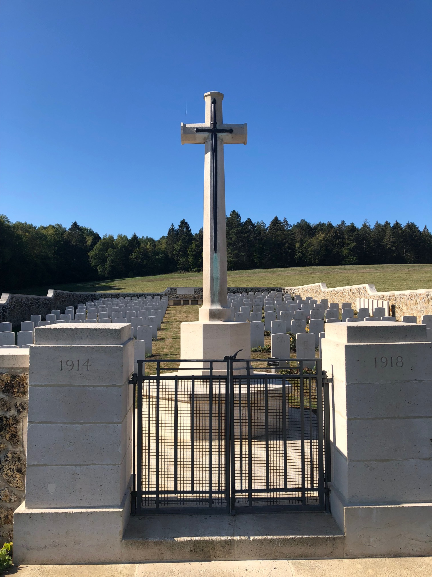 Entrée du cimetière britannique de courmas, avec sa grande croix.